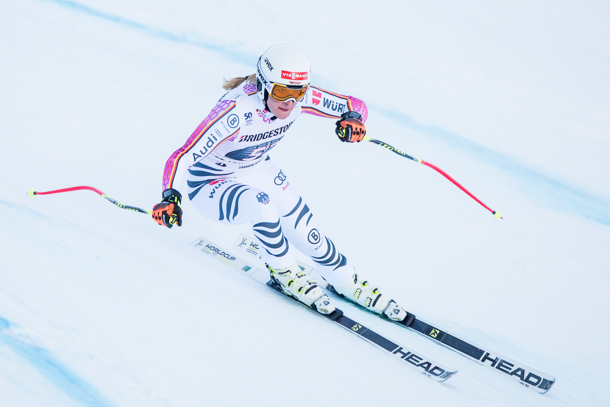 64. Kandahar Rennen,Audi FIS Ski Weltcup Garmisch-Partenkirchen,Damen Abfahrt,Kandahar,Katrin Hirtl-Stanggaßinger,Ladies Downhill